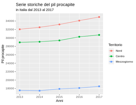 file realizzato con RStudio con dati Istat